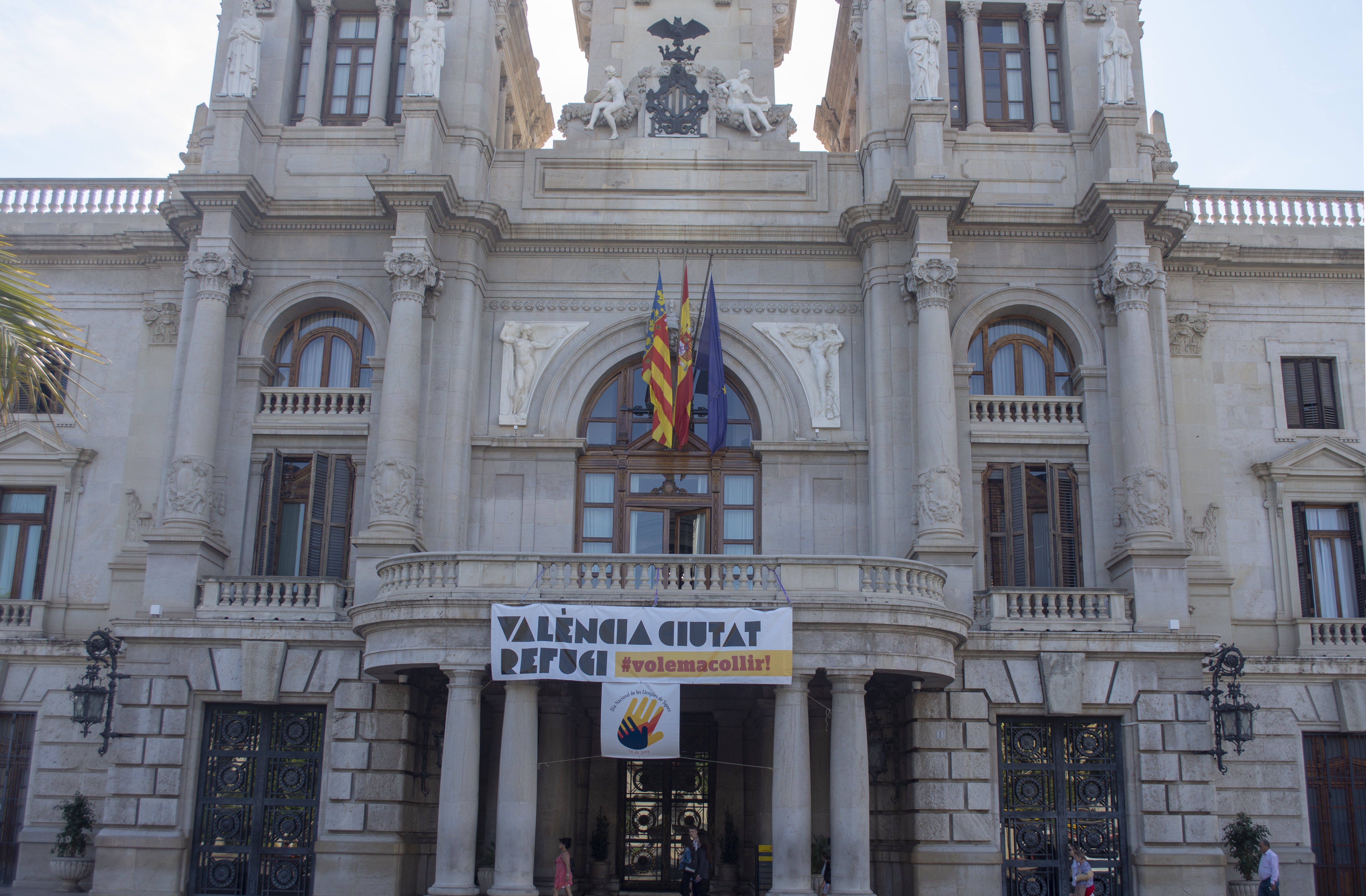 Pancarta desplegada en el el Ayuntamiento de Valencia con motivo de la llegada de los barcos, Dattillo y Orione al puerto de la ciudad con 629 migrantes recogidos en aguas del Mediterráneo.